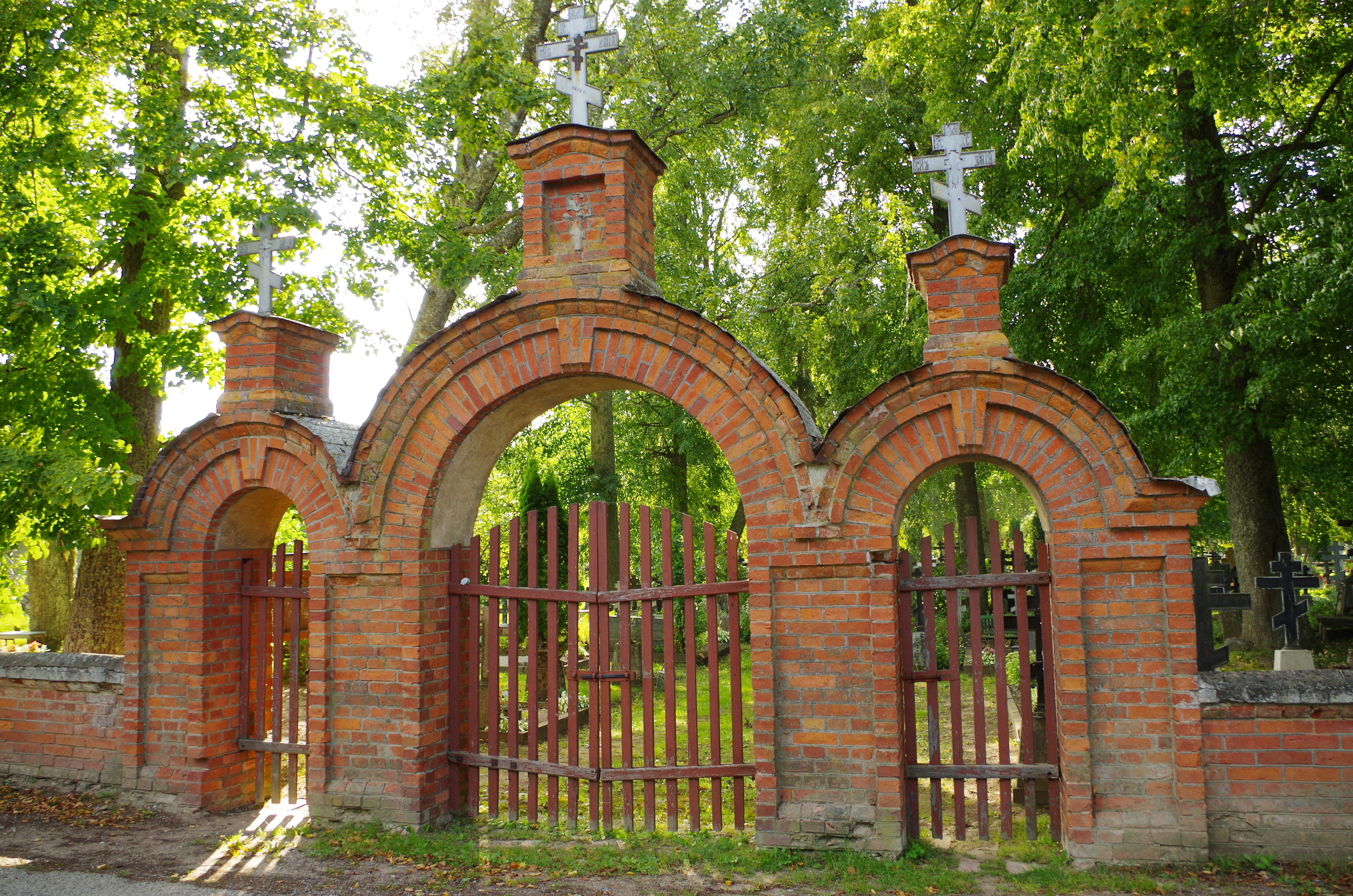 Varnja kalmistu